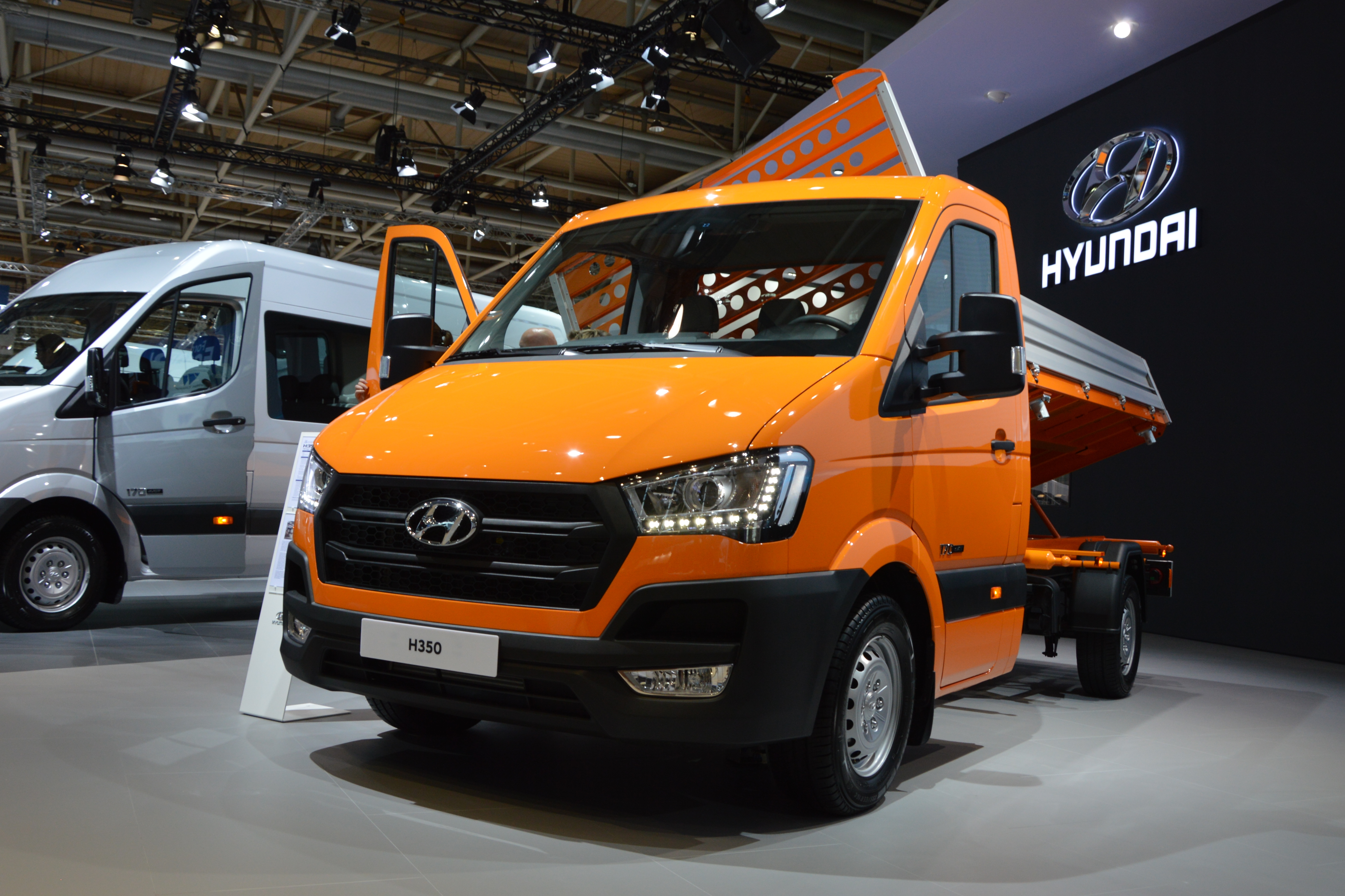 Hyundai H350 Dreiseitenkipper 2.5 CRDi Profi L3. Kippmodul von Henschel Engineering Automotive.